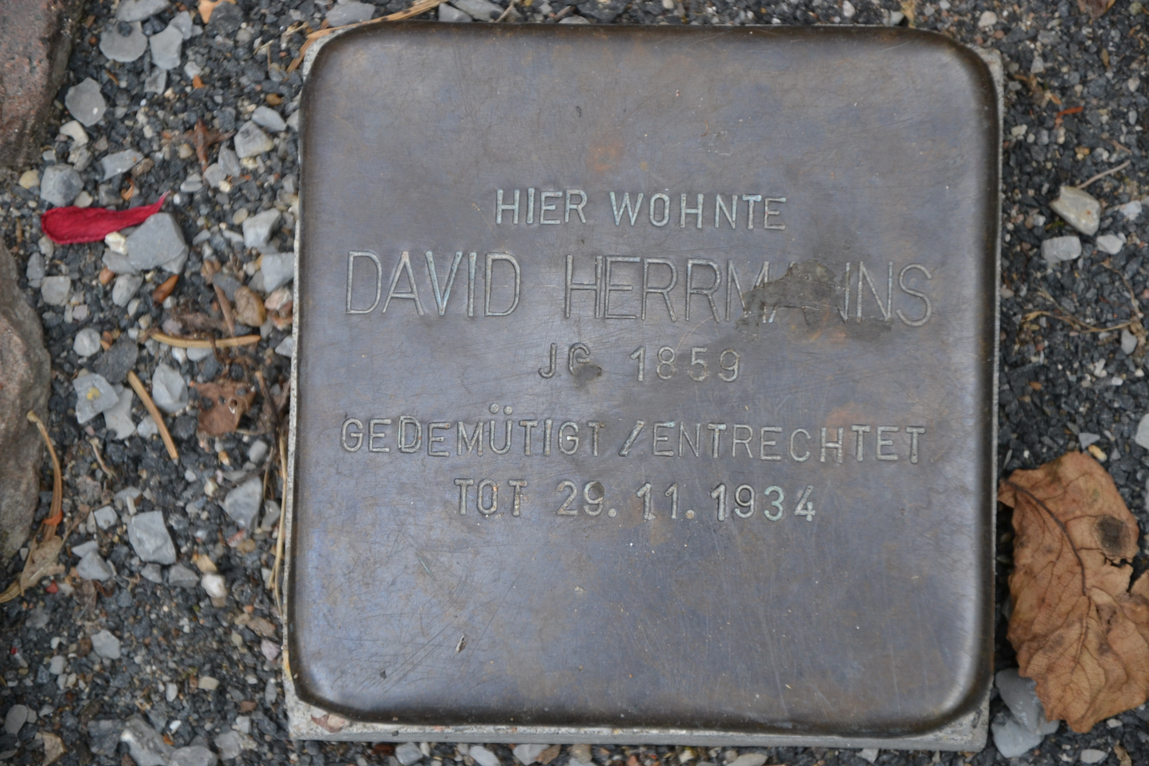 Stolperstein